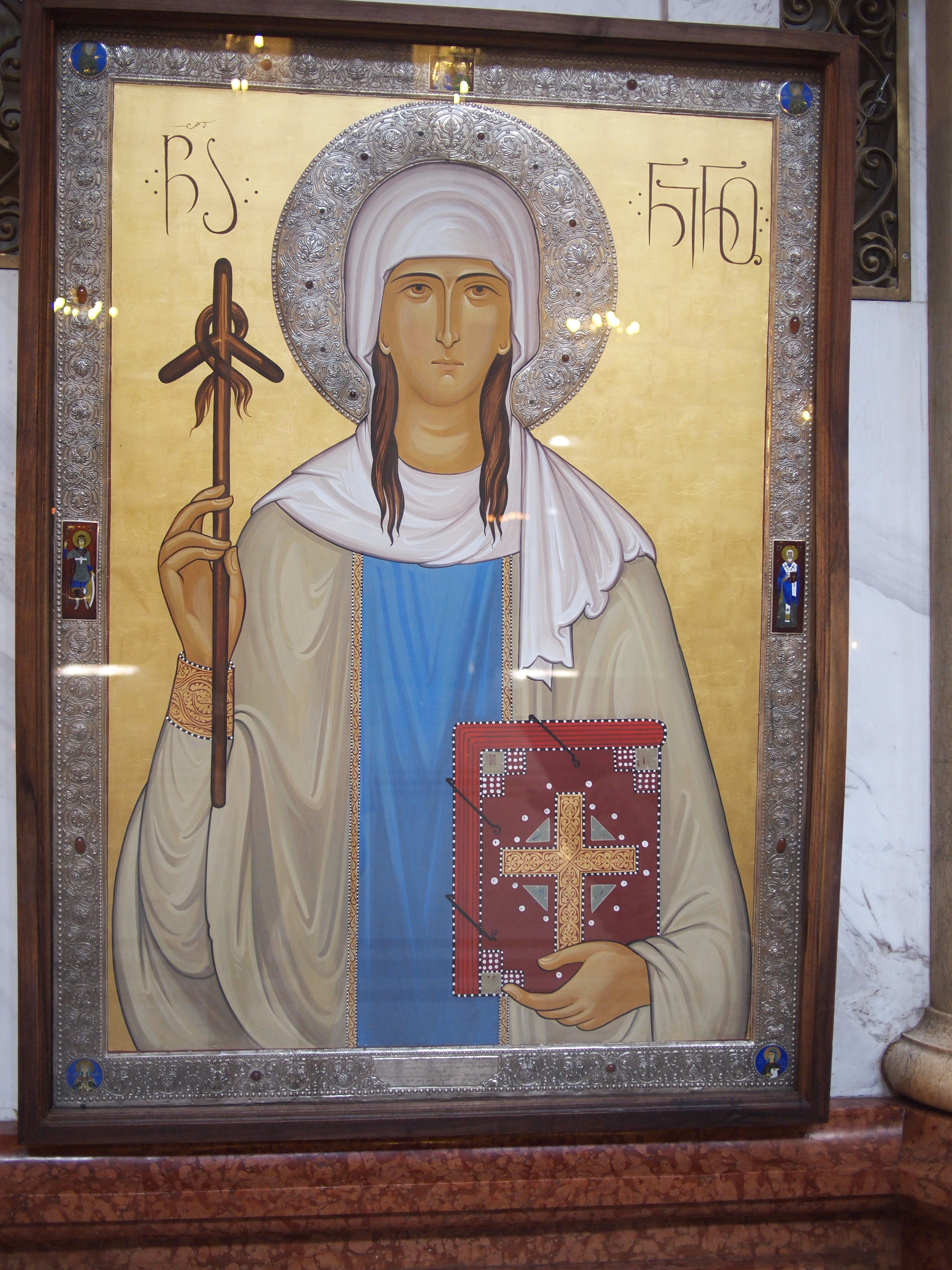 epl115_8209334